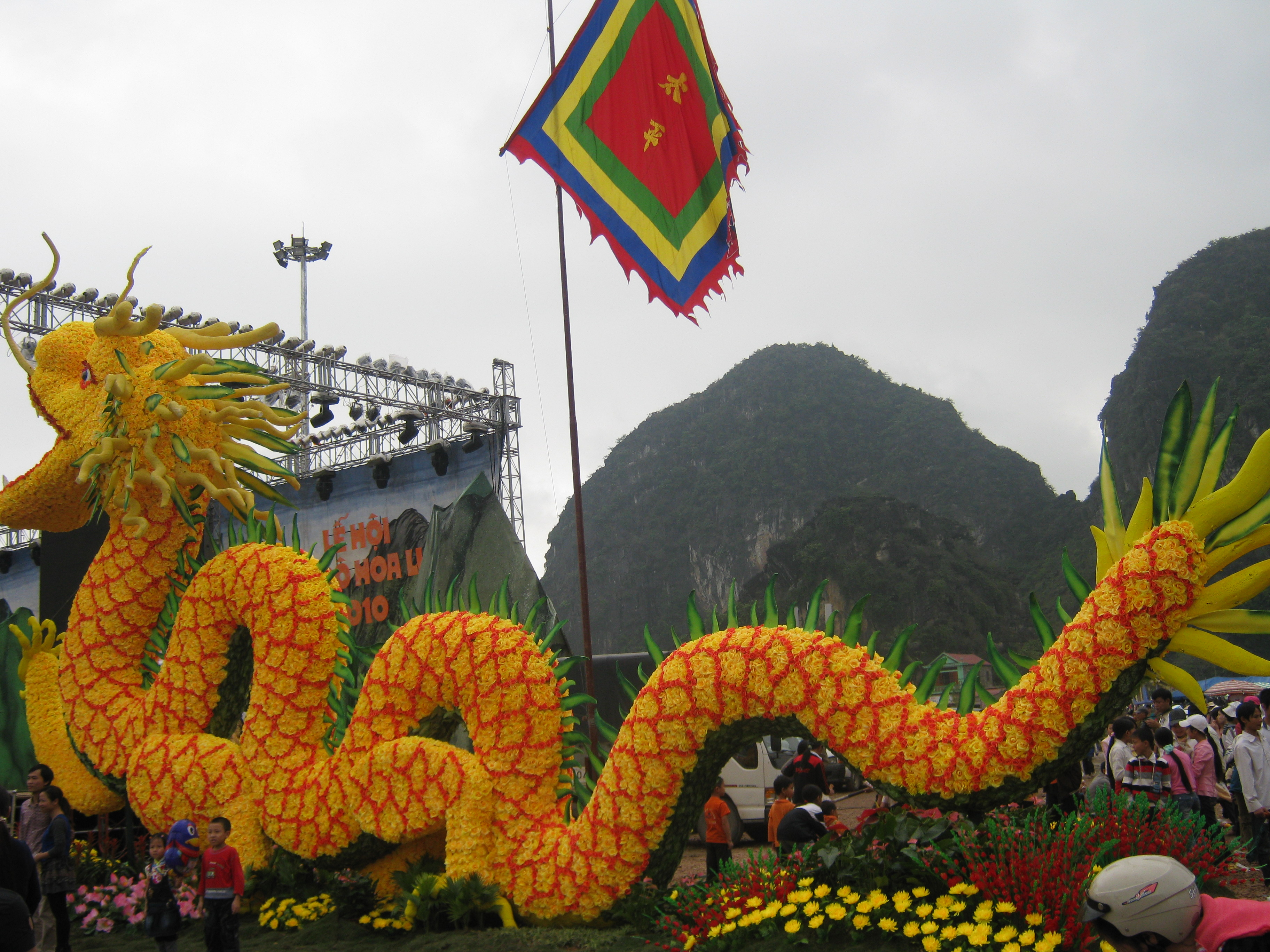 Lễ hội cố đô Hoa Lư 2010.